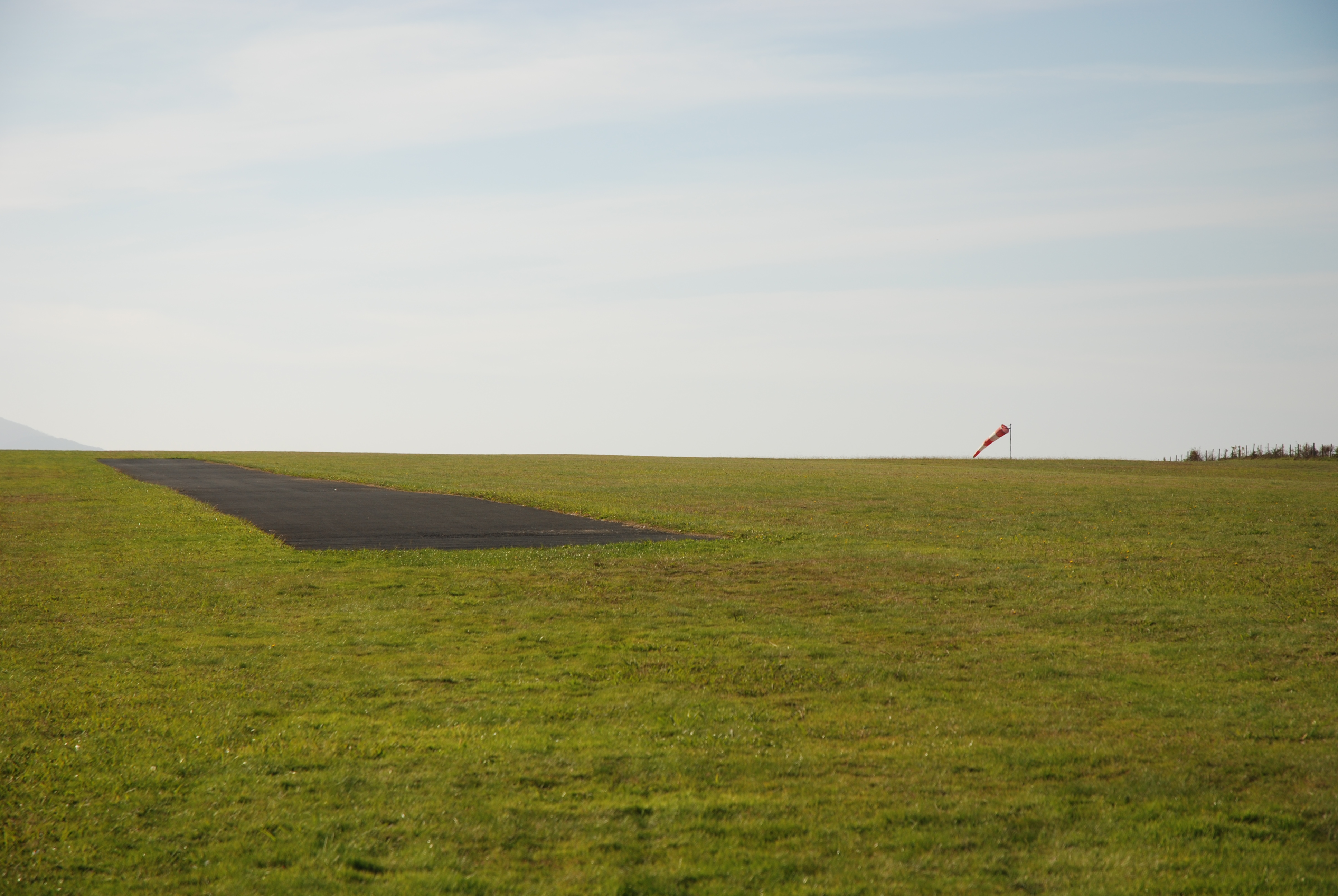 Itxassou, l'aérodrome